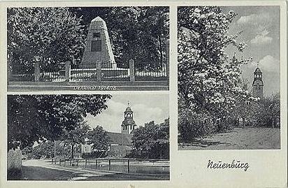 Pocztówka z Nowogródka Pomorskiego (przełom XIX i XX wieku)